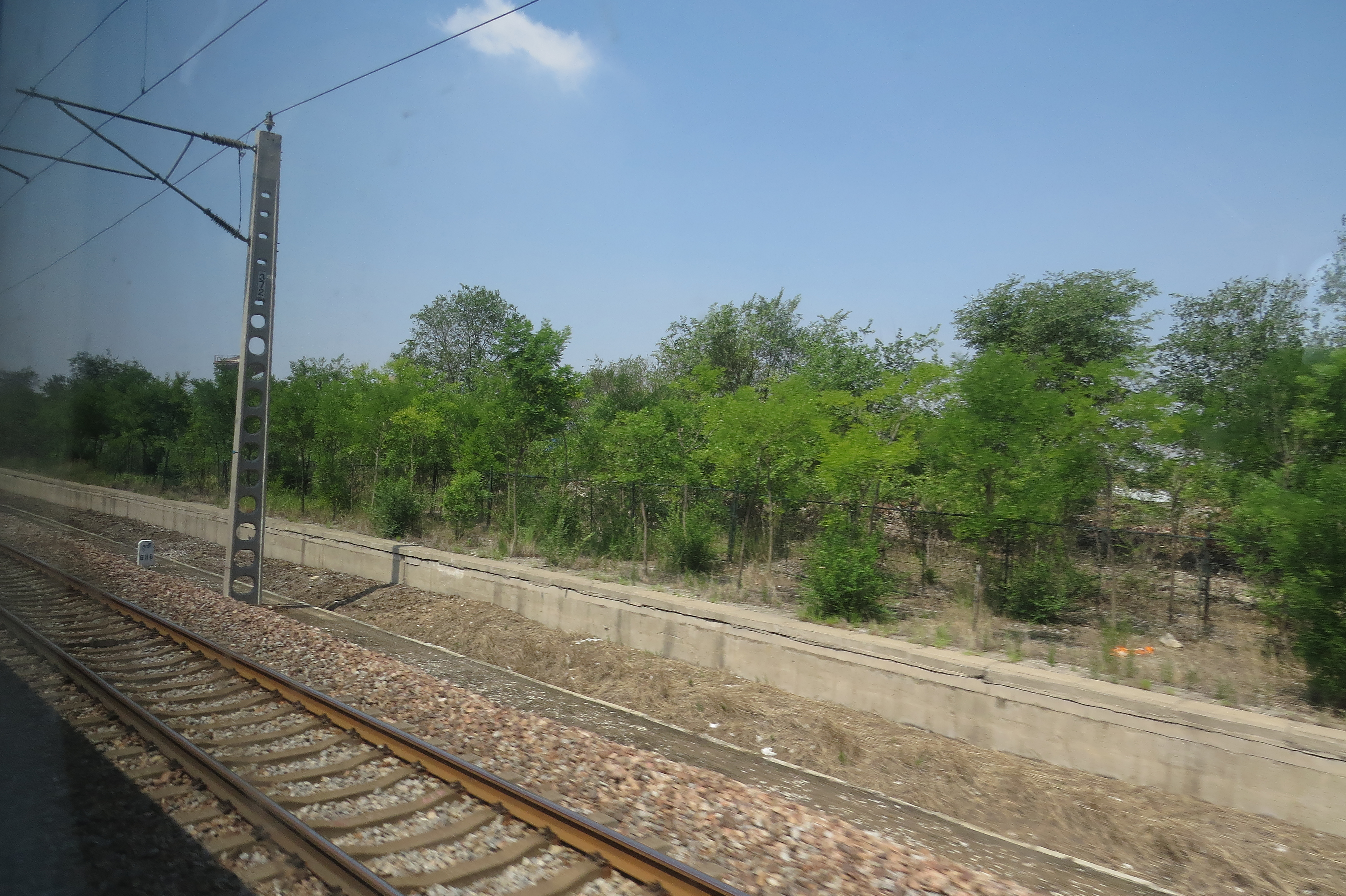 辛中驿站遗址